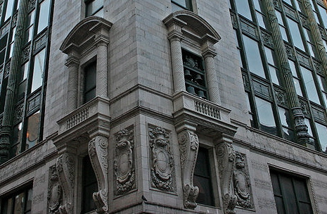 Filene's carillon